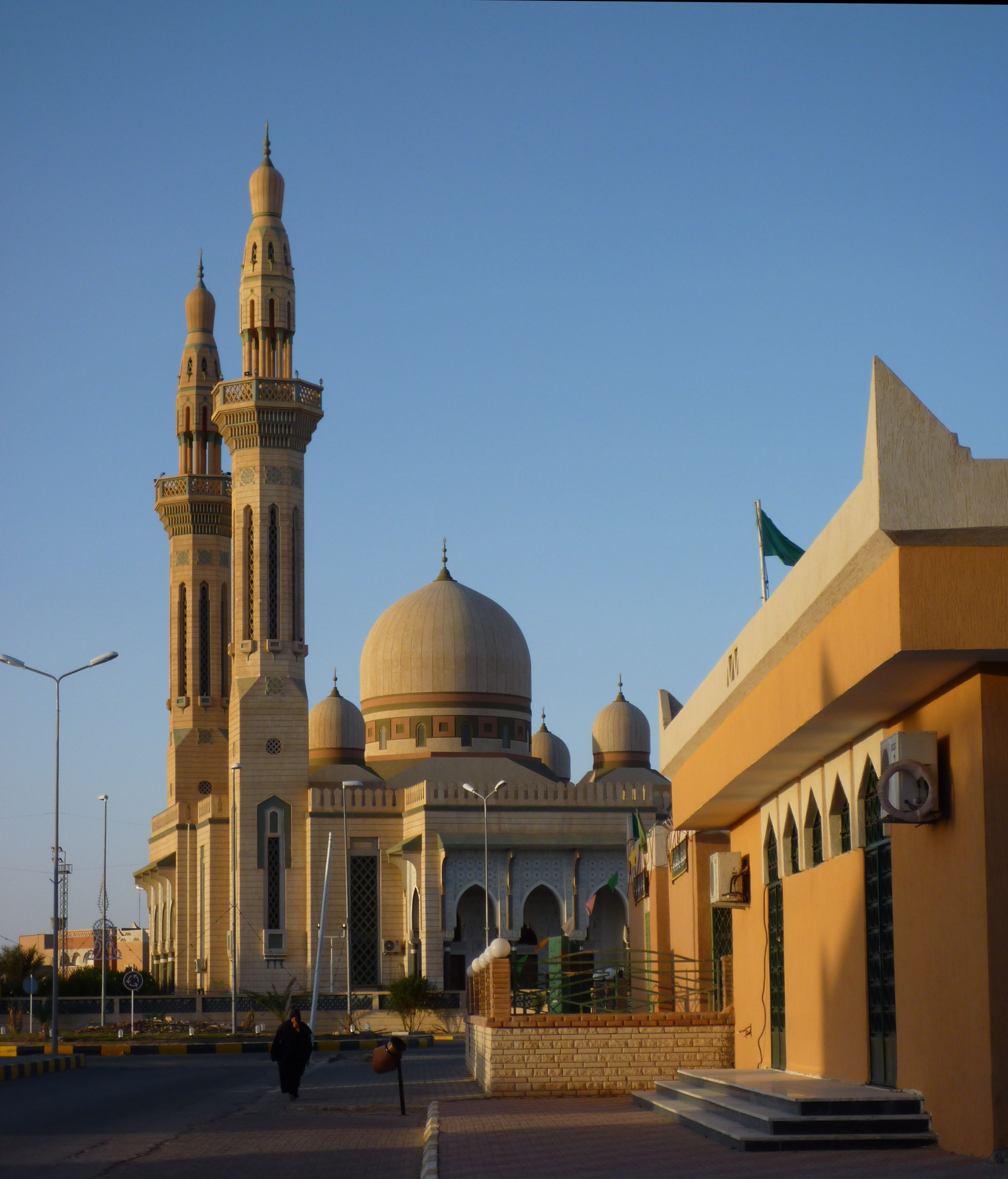 Ghadames - Grosse Moschee